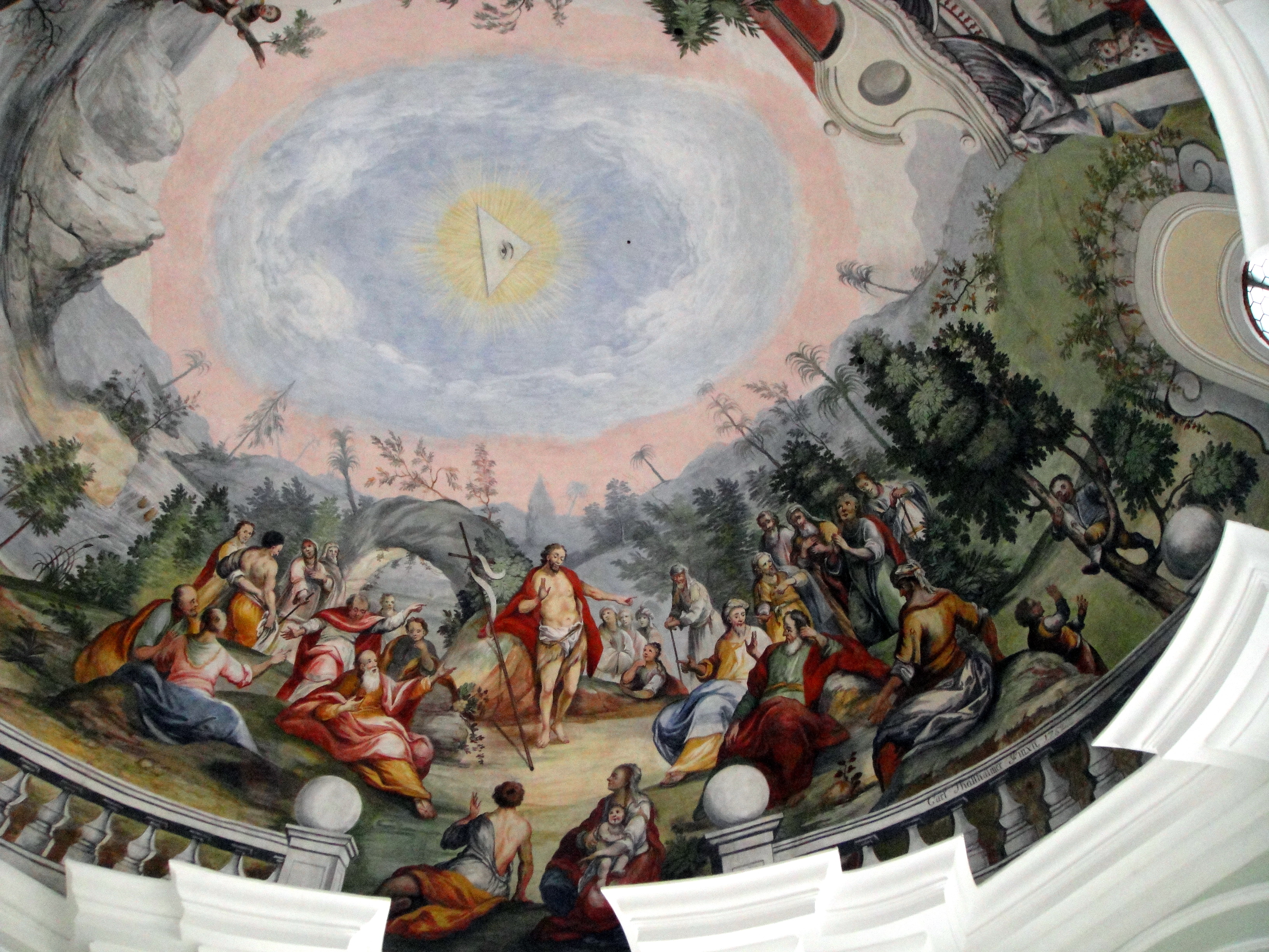 St. Johannes am Vorderanger (Landsberg am Lech), Fresko - Predigt St. Johannes des Täufers